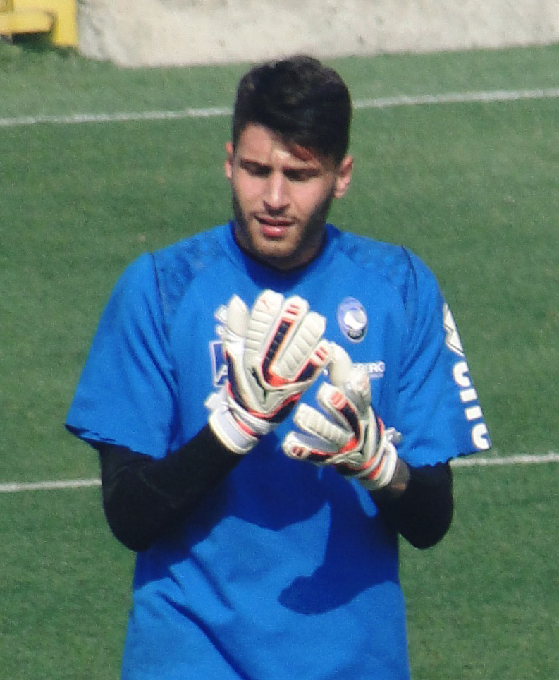 Marco Sportiello, portiere italiano, in allenamento all'Atalanta.